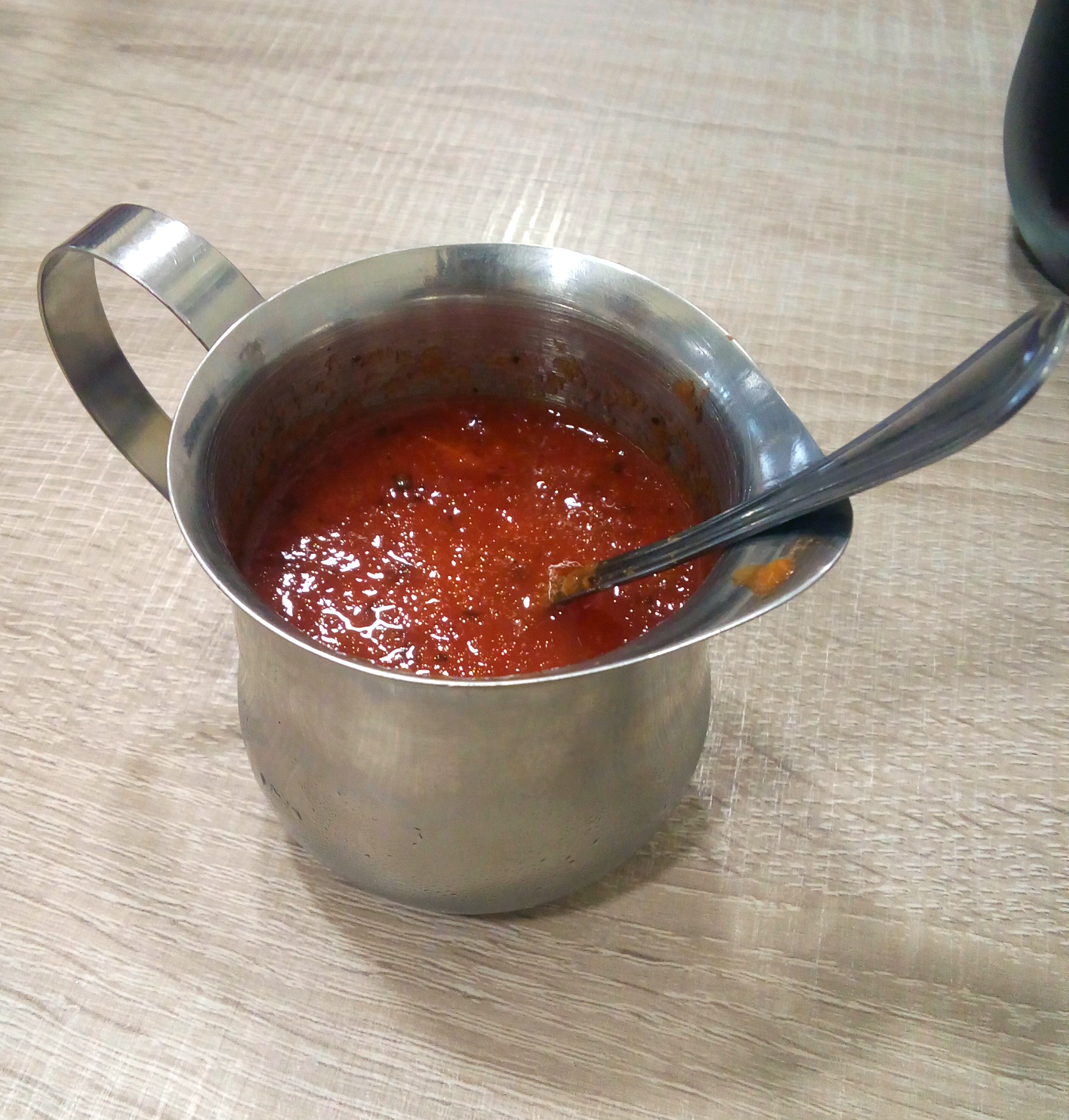 Salsa de rocoto (llatan) que sirve de acompañante y sazonador de diversos platos de la gastronomía peruana.